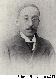 服部宇之吉、中国哲学の泰斗